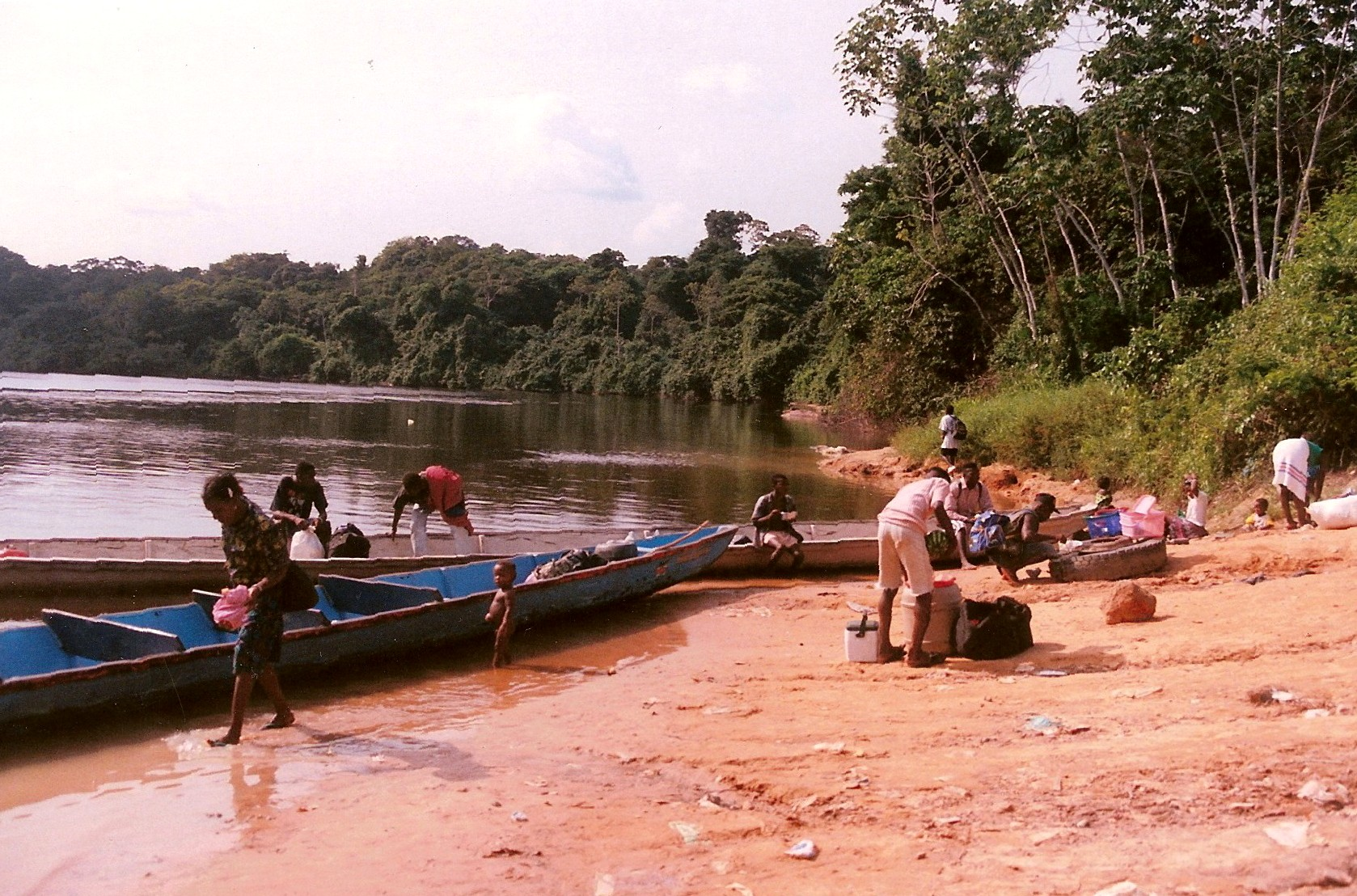 De landingsplaats Atjoni bij Pokigron in Suriname. Eigen opname.